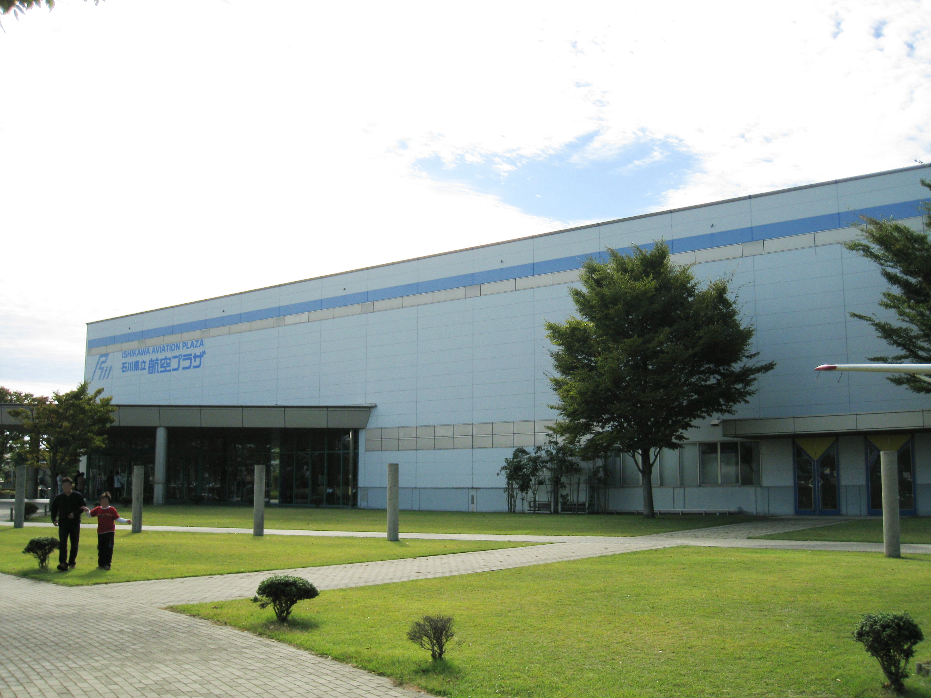 石川県立航空プラザ。石川県小松市Ishikawa Aviation Plaza (石川県立航空プラザ Ishikawakenritsu Kōkū Plaza), in Komatsu, Ishikawa, Japan